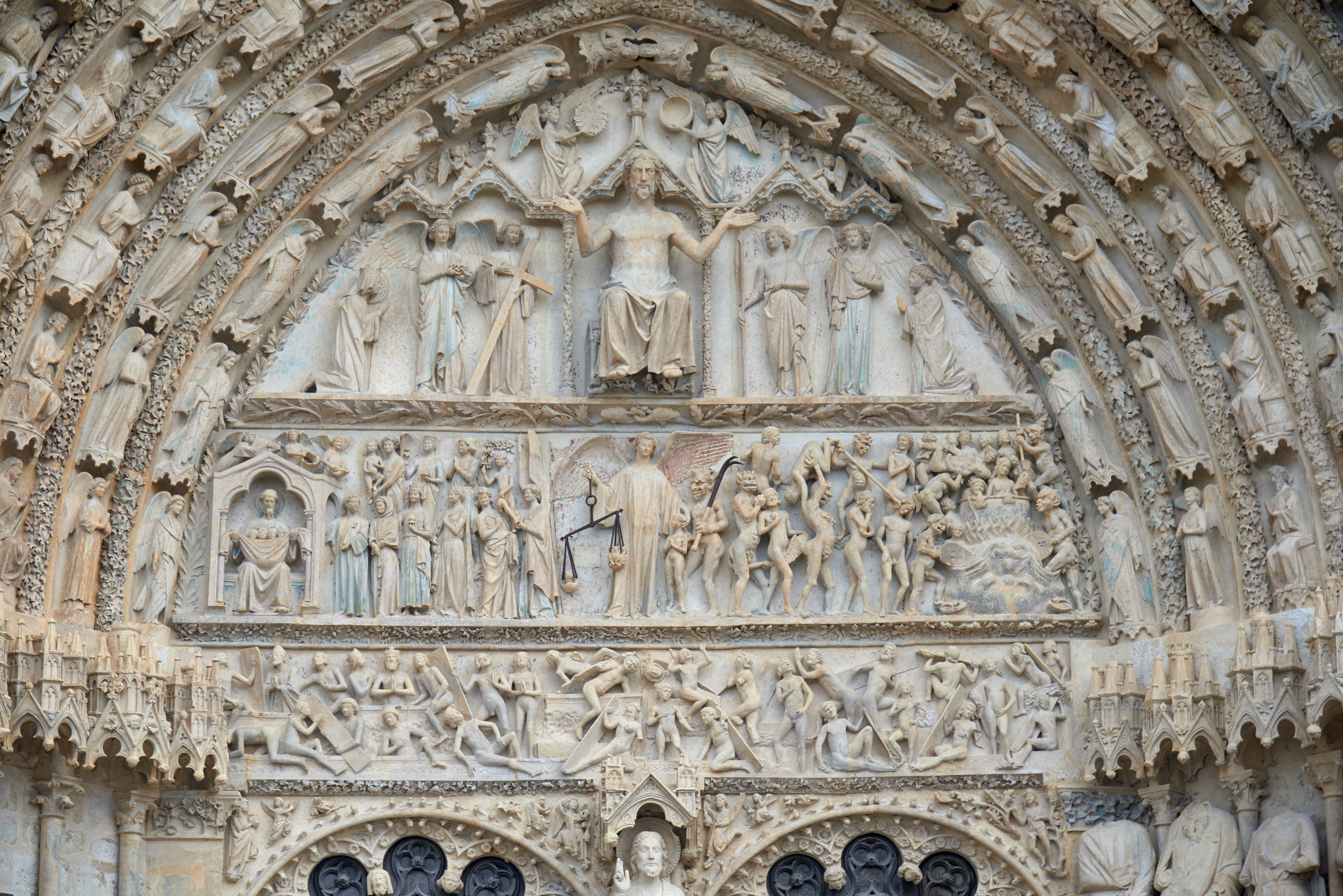 Cathédrale Saint-Étienne de Bourges